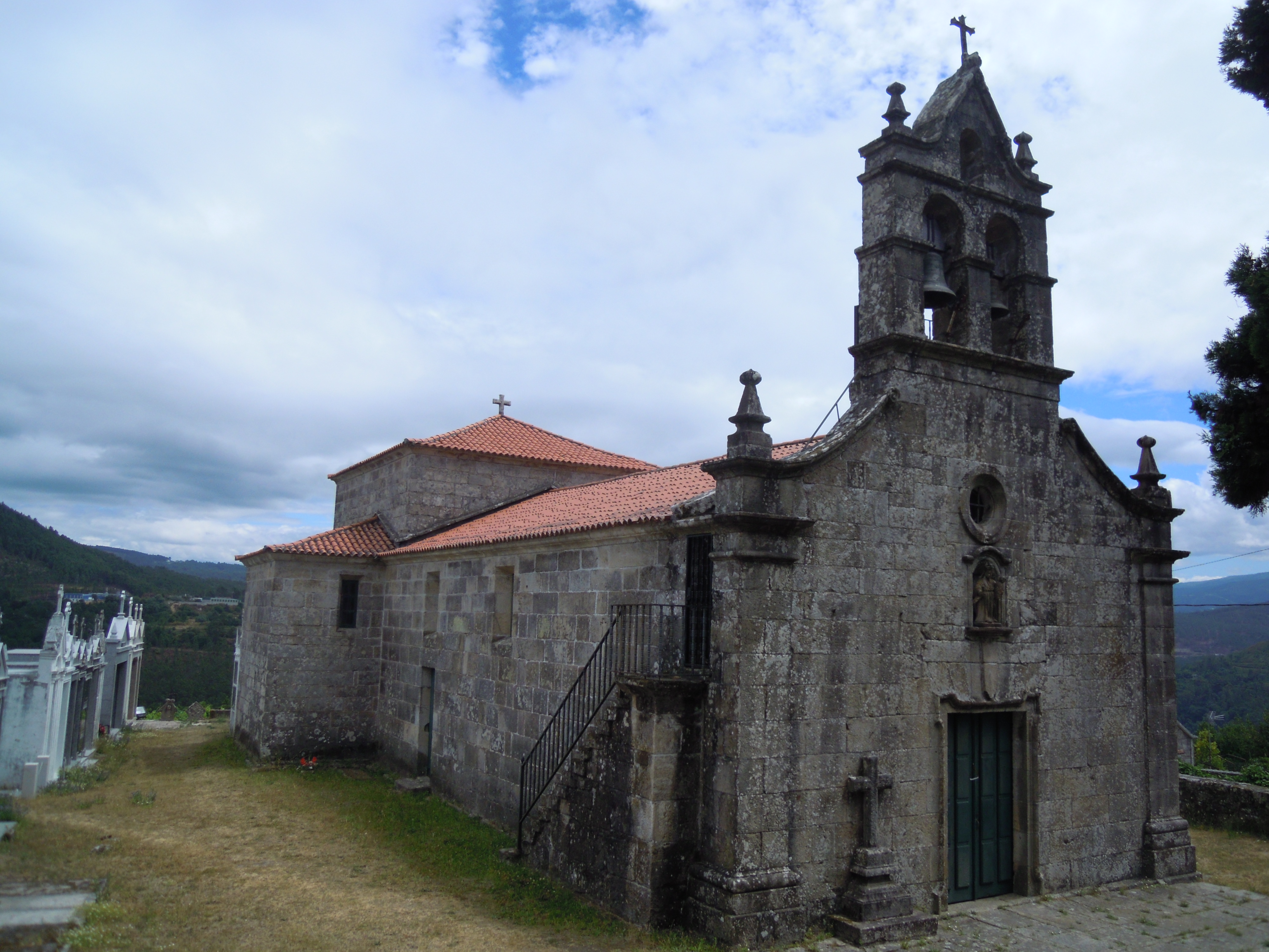 Igrexa de Santa María de Rebordechán (Crecente)